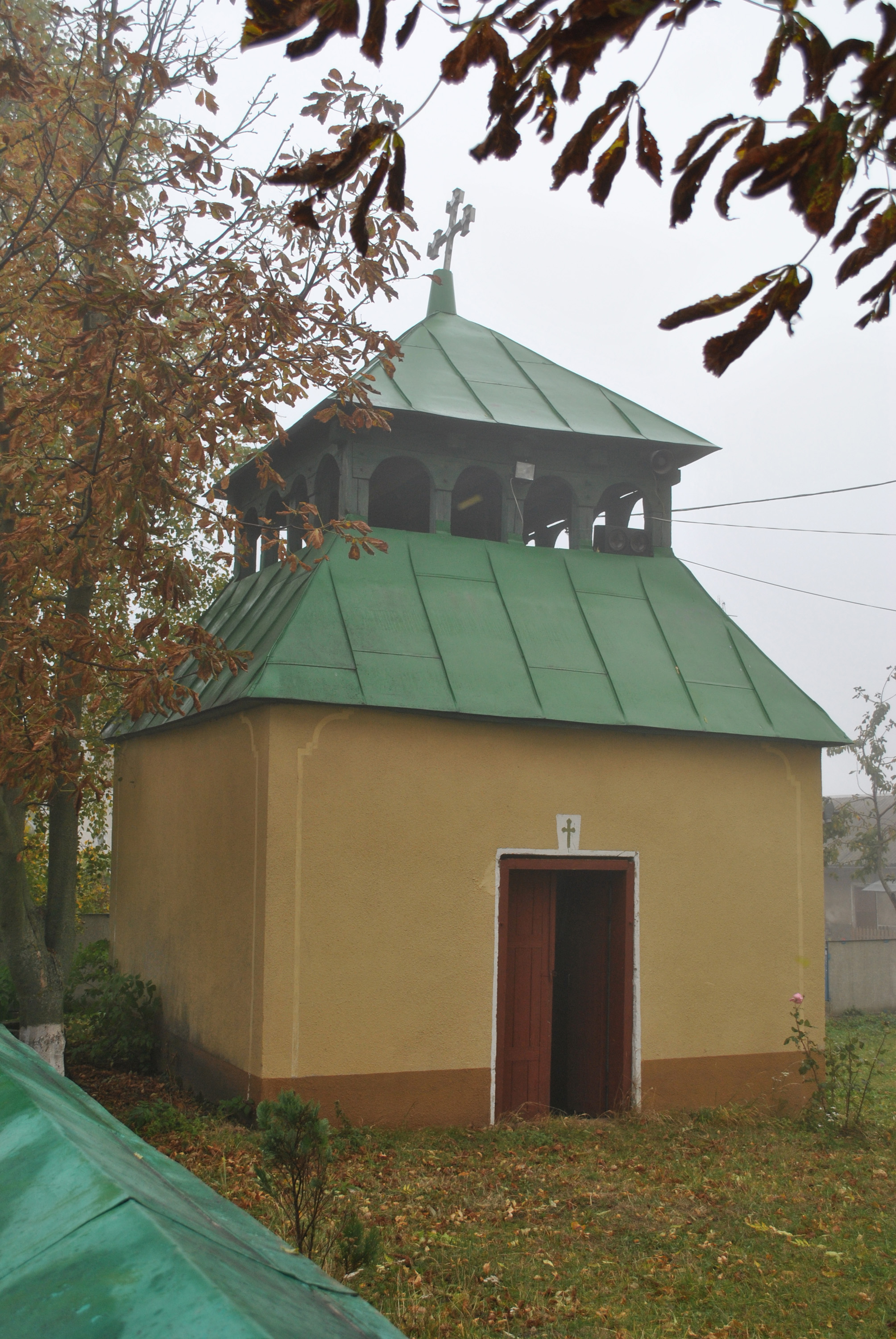 Дзвіниця церкви Святої Трійці в селі Пишківці Бучацького району Тернопільської області.